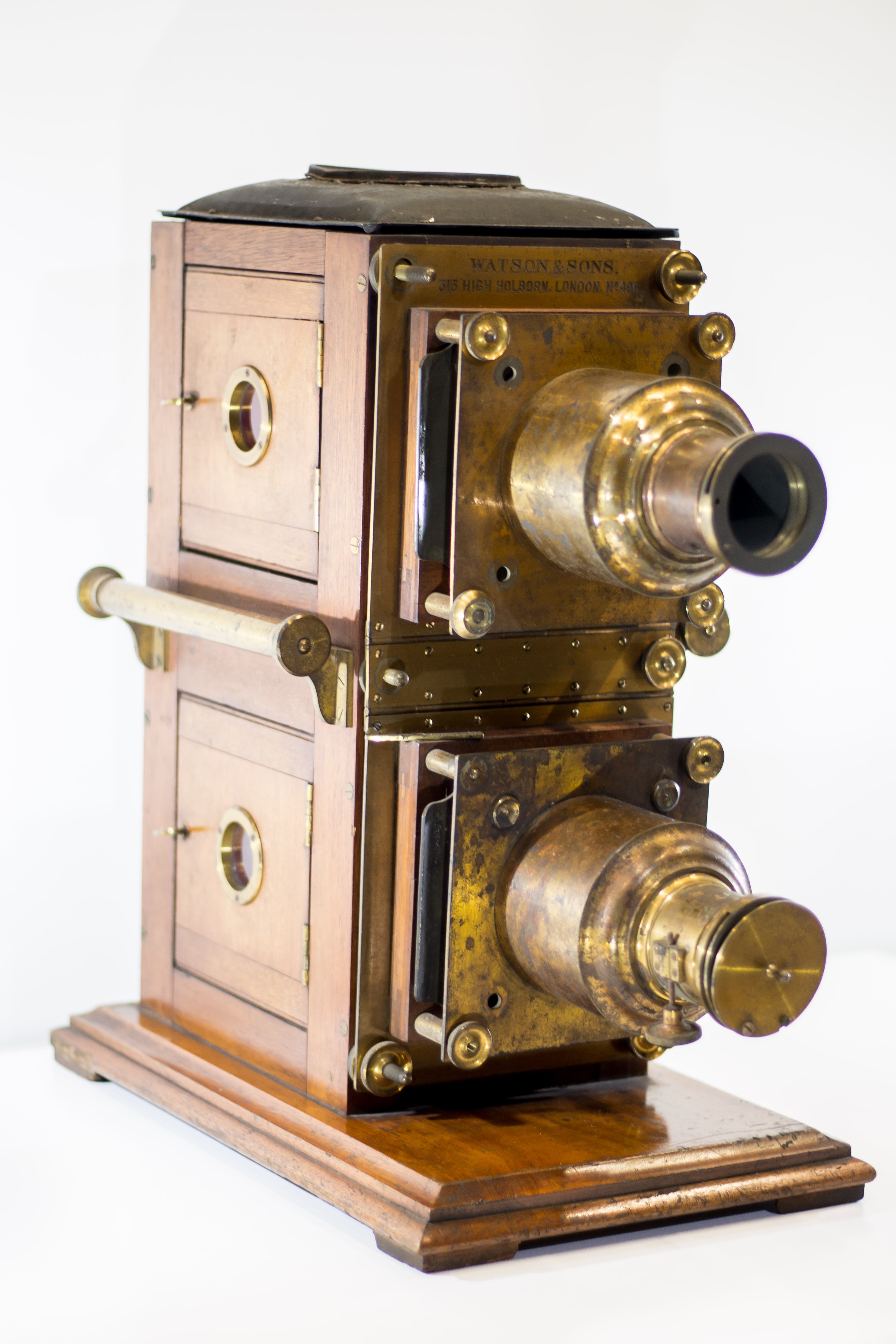 Lanterne magique Watson et Sons, appartenant à Léon Losseau et se trouvant à la Maison Losseau à Mons